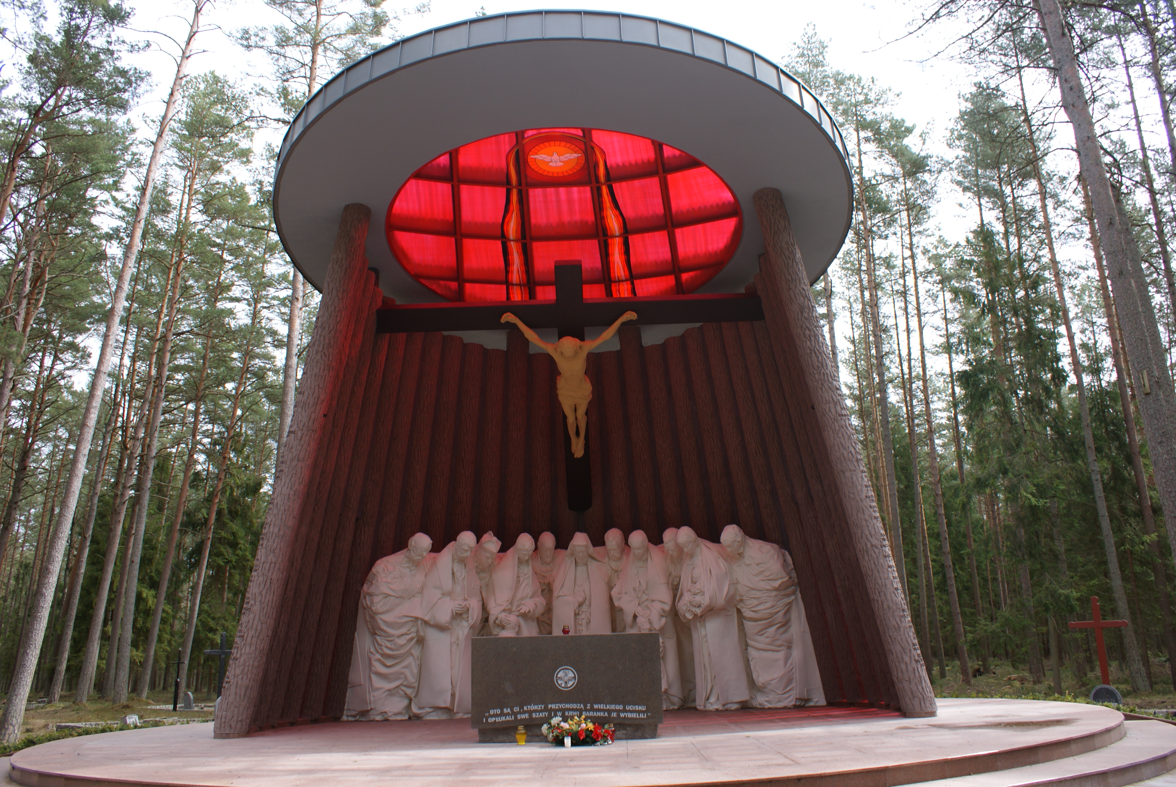 Kaplica-mauzoleum w lesie piaśnickim pod Wejherowem (odsłonięta w 2010).